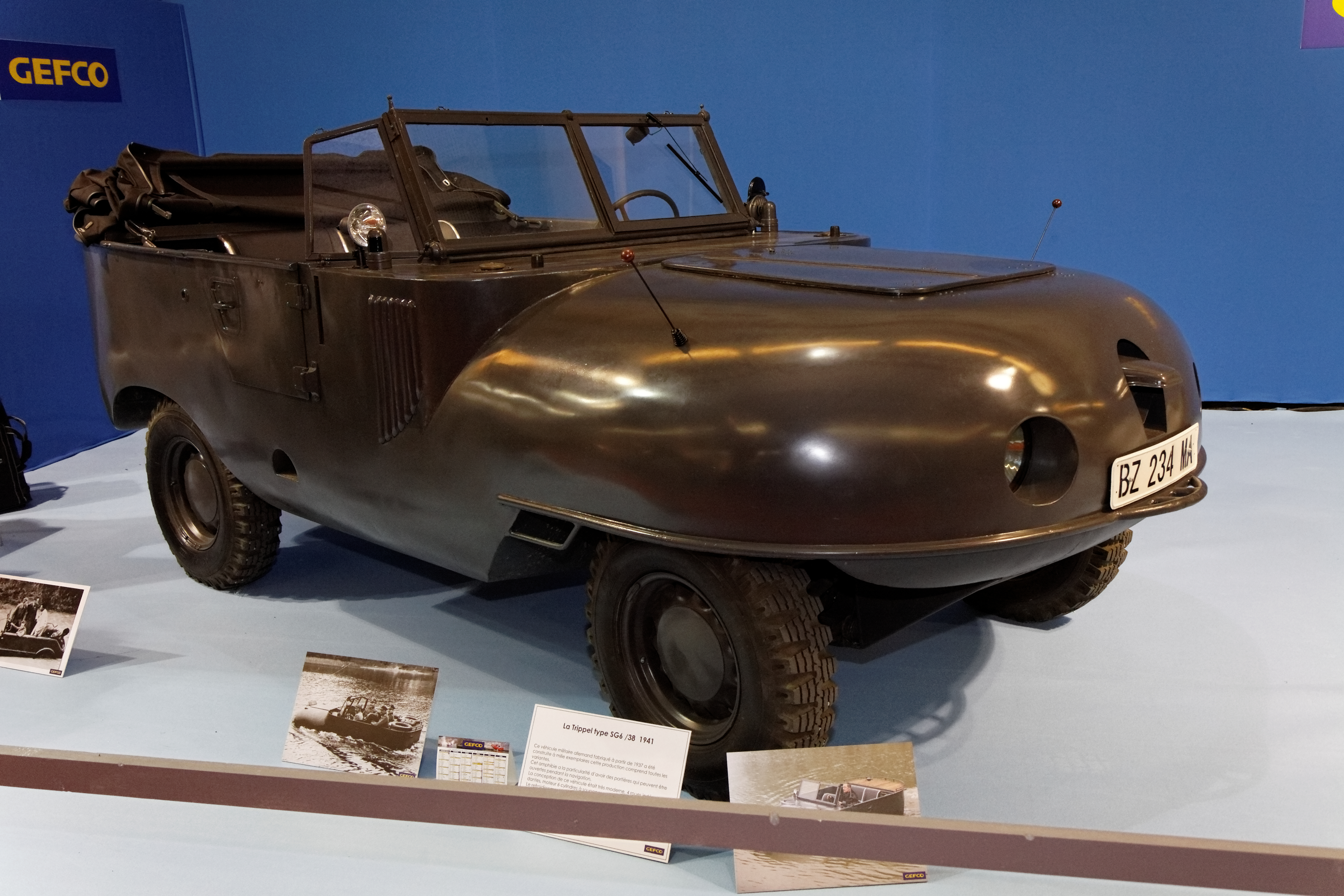 La Trippel type SG6 38